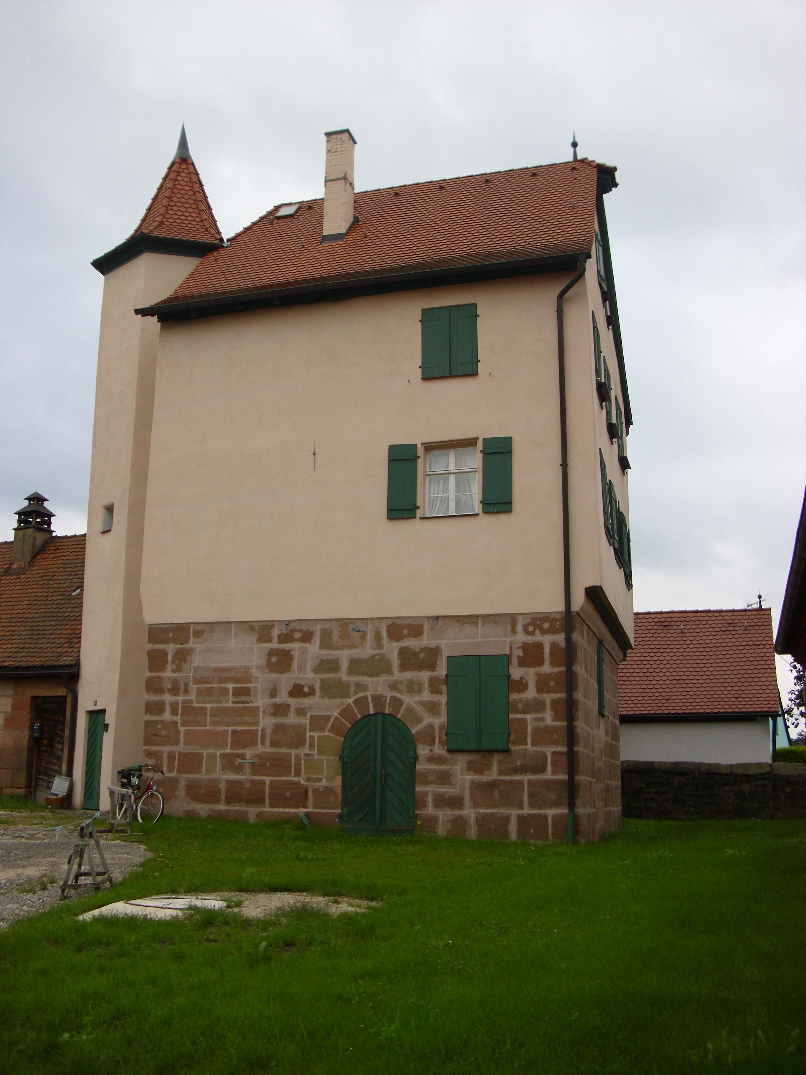 Altes Tucherschloss in Behringersdorf von 1553